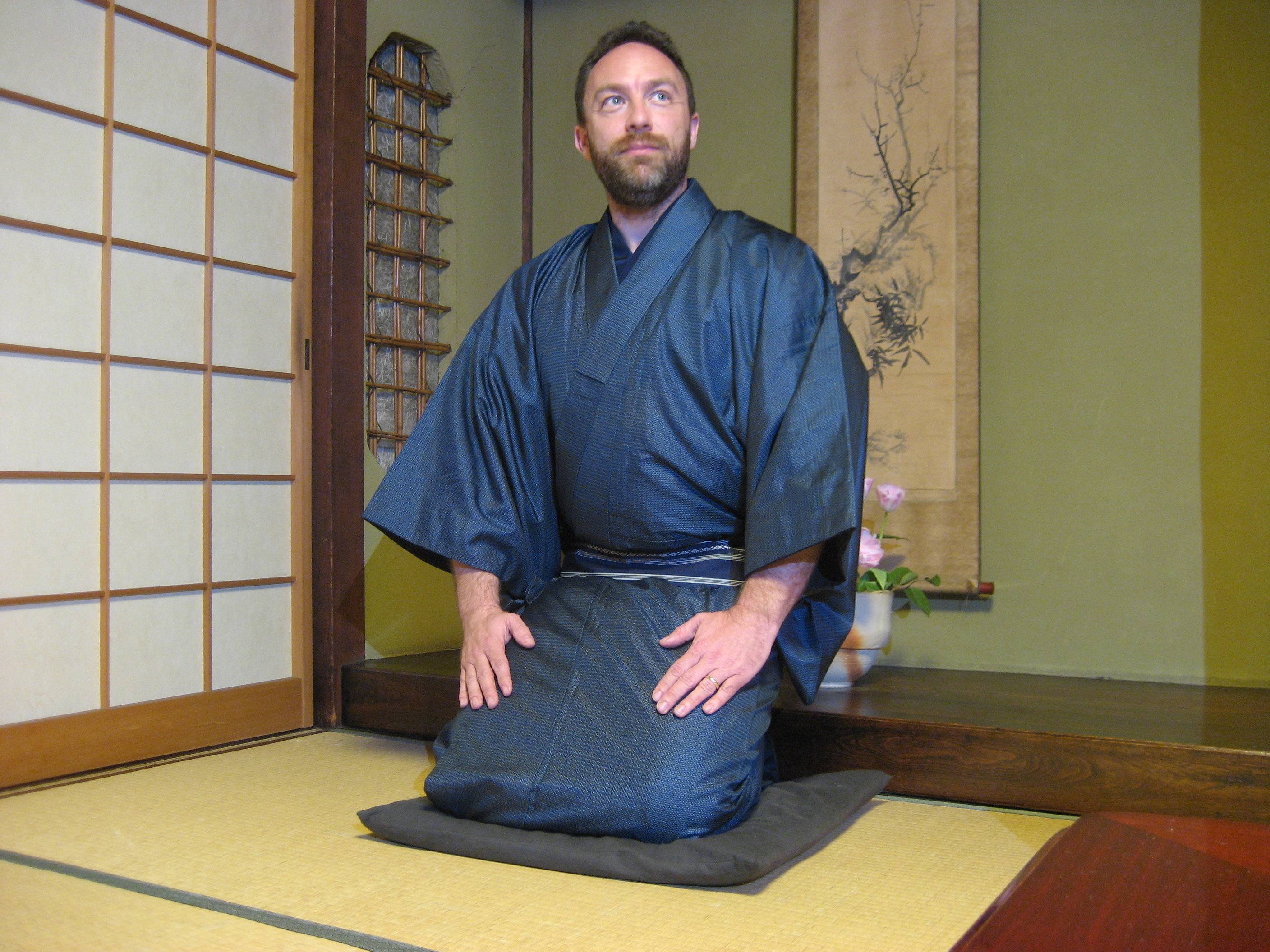 Jimbo Wales wearing Kimono, taken in Kyoto, Japan.